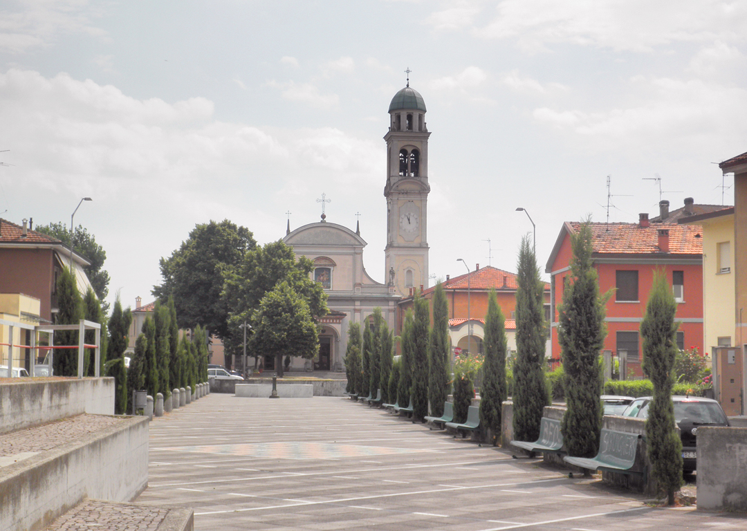 Panorama di San Martino in Strada